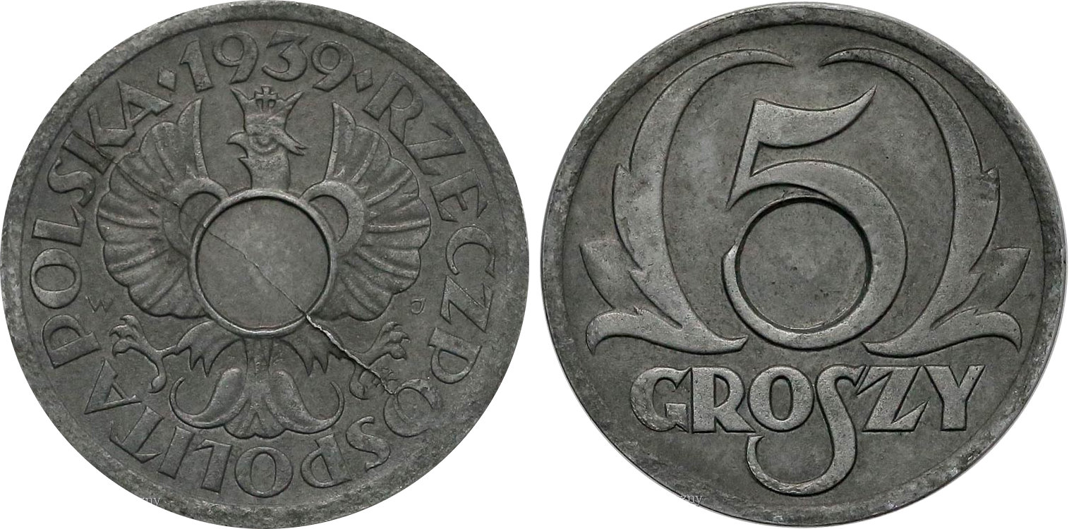 5 groszy 1939 cynk bez otworu oryginał